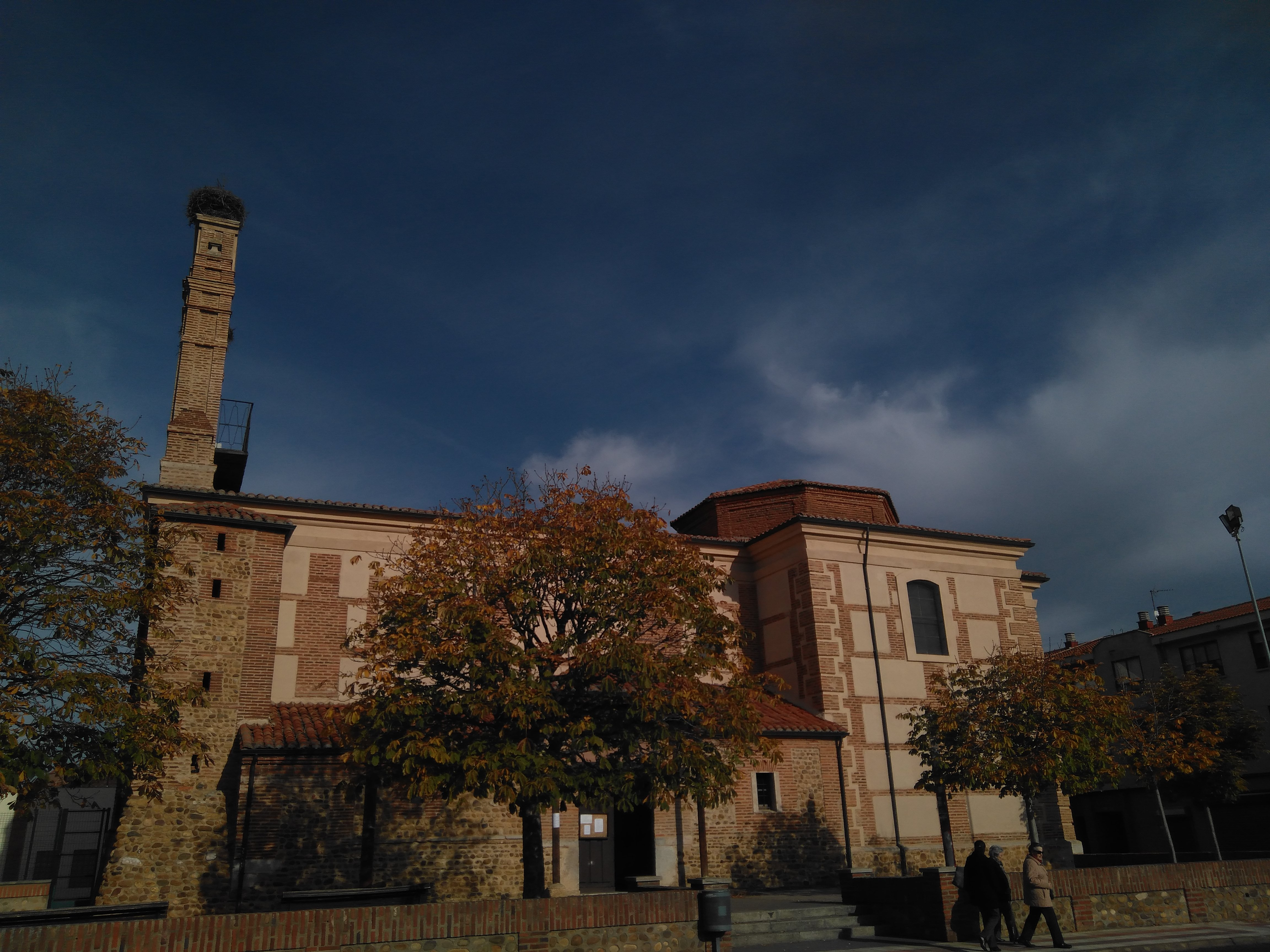 Fachada de la iglesia